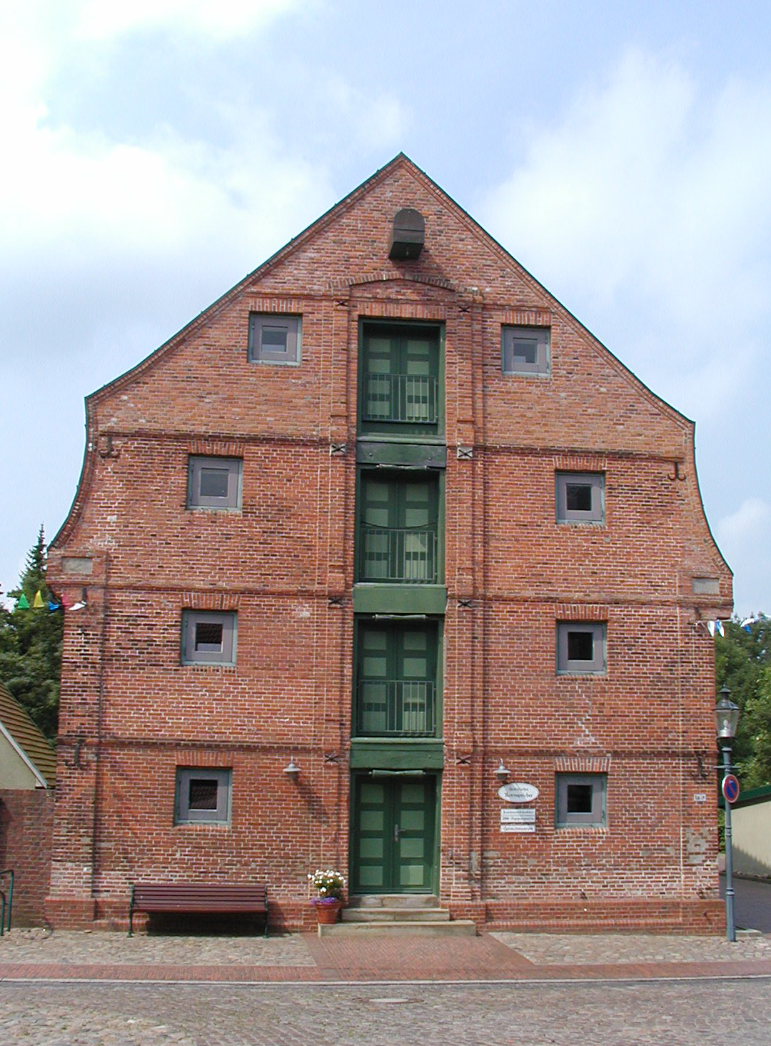 Ein alter Speicher in Neuhaus (Oste)